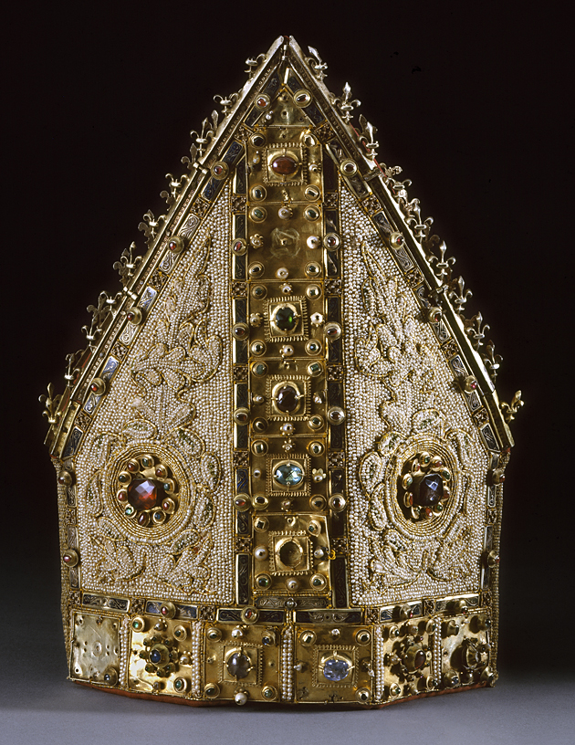 Mitra biskupia